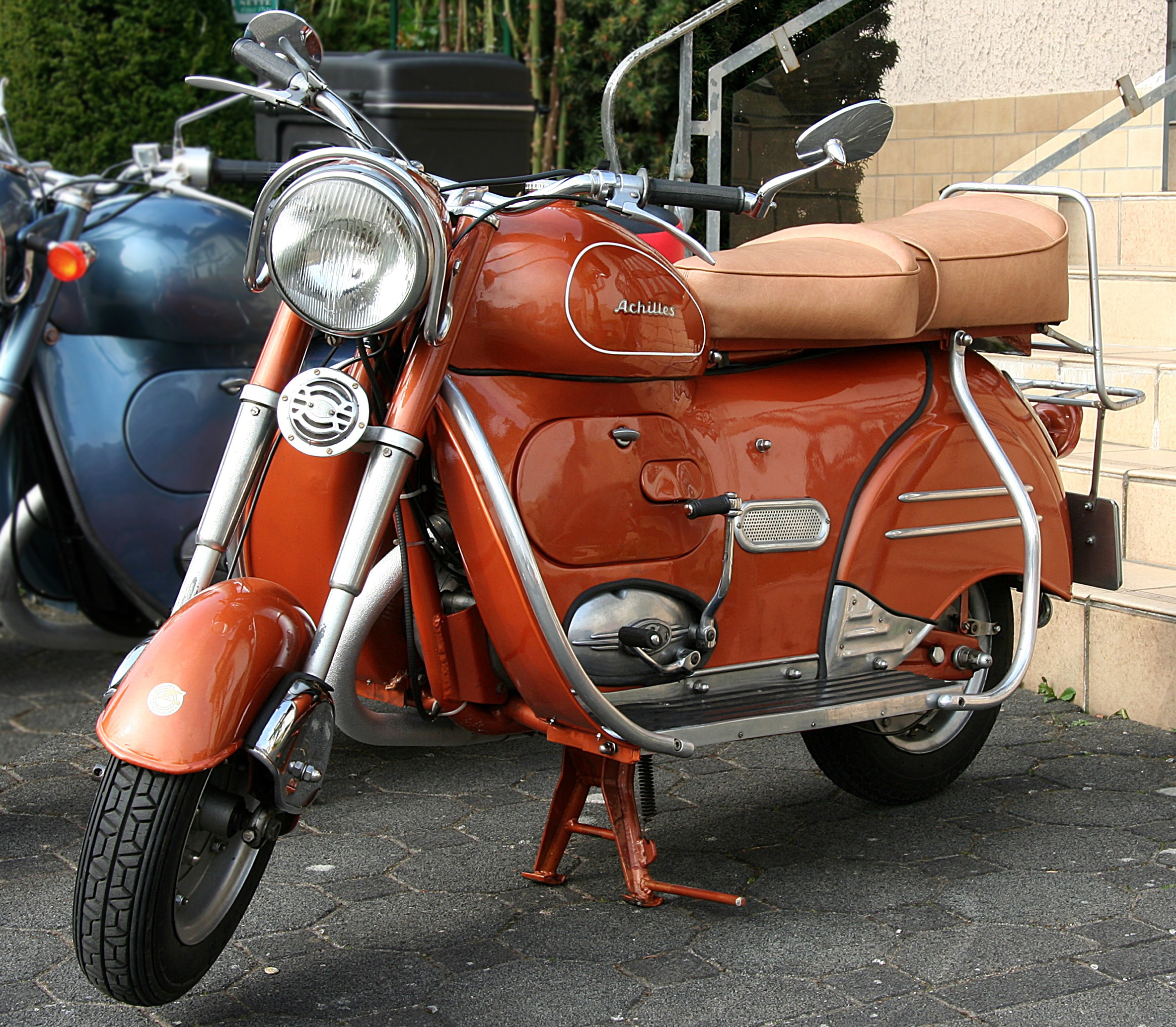 Achilles-Sport 175 cm³, Baujahr 1955; Originallackierung